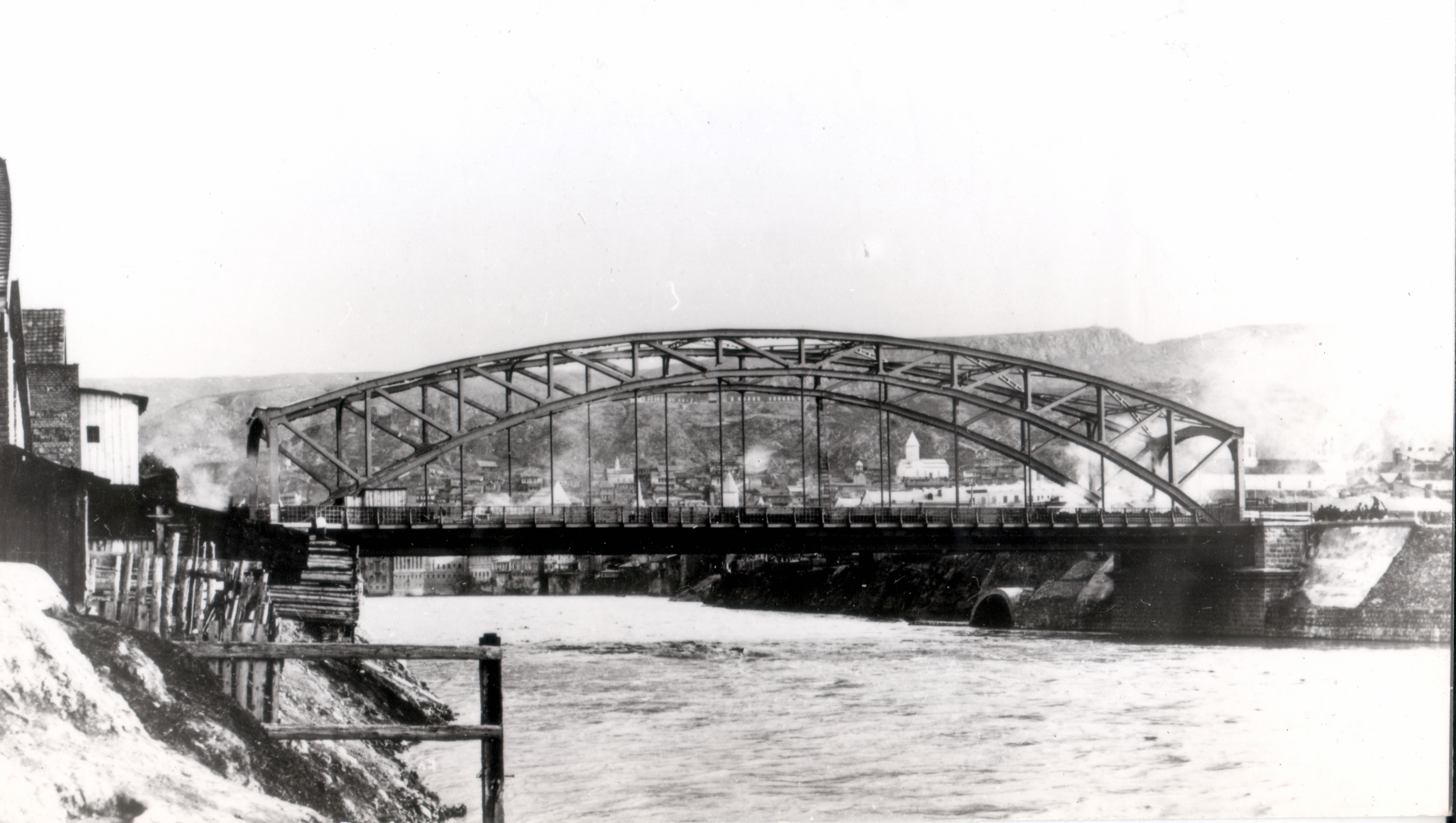 Мухранский мост через Куру в Тифлисе